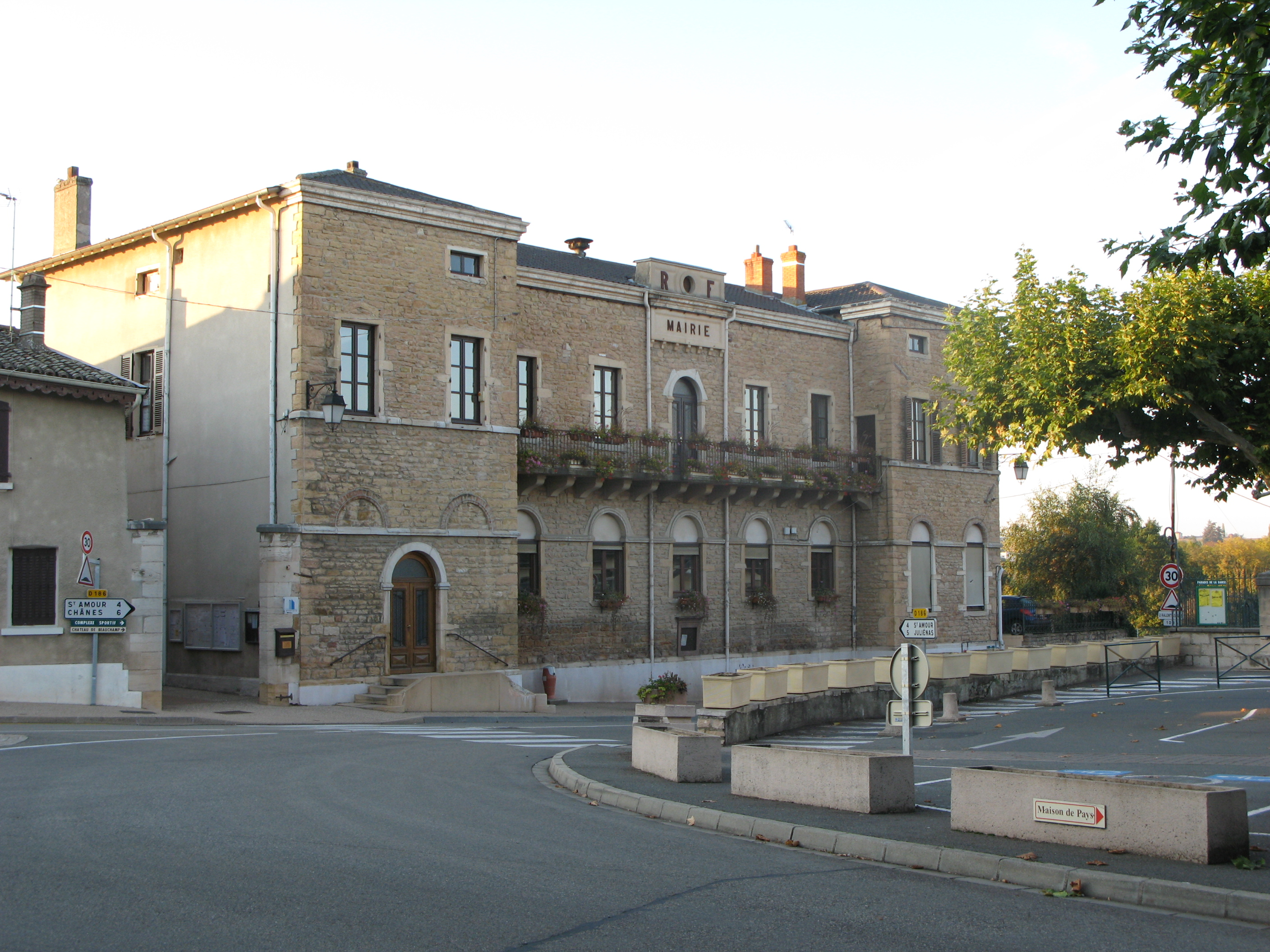 La Chapelle-de-Guinchay dans le département français Saône-et-Loire : mairie.